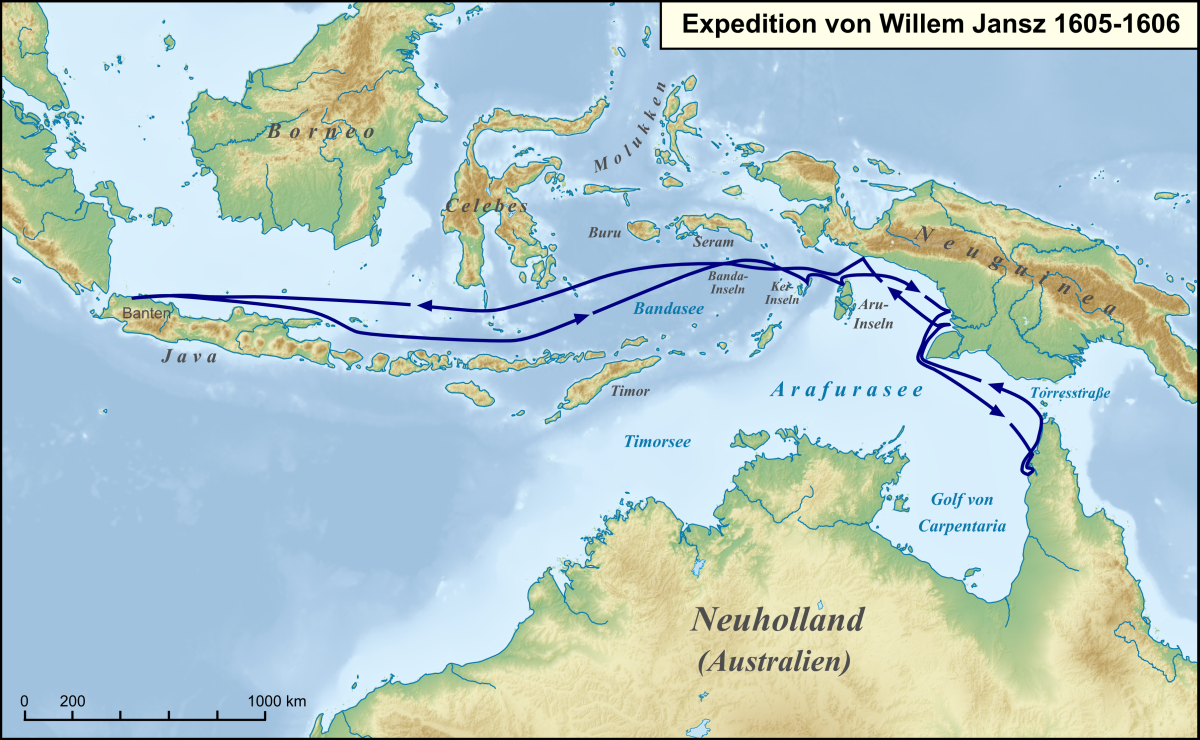 Karte der Route der Expedition von Willam Jansz 1605 bis 1606. Jansz gilt als der offizielle Entdecker Australiens im März 1606.